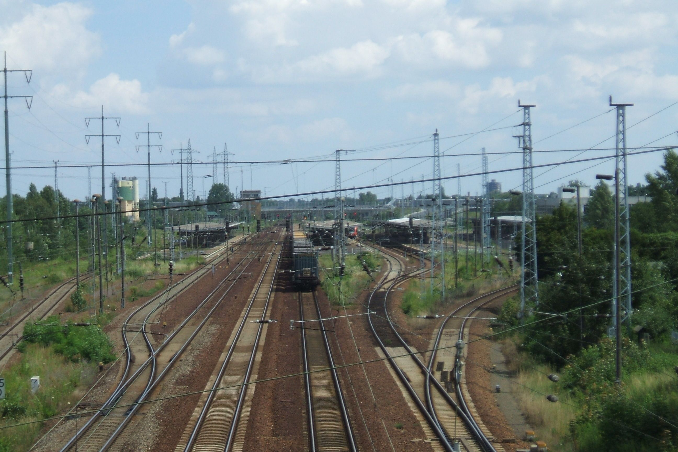 Bahnhof Berlin-Schoenefeld Flughafen die Gleise von der westlichen Fußgängerbrücke aus